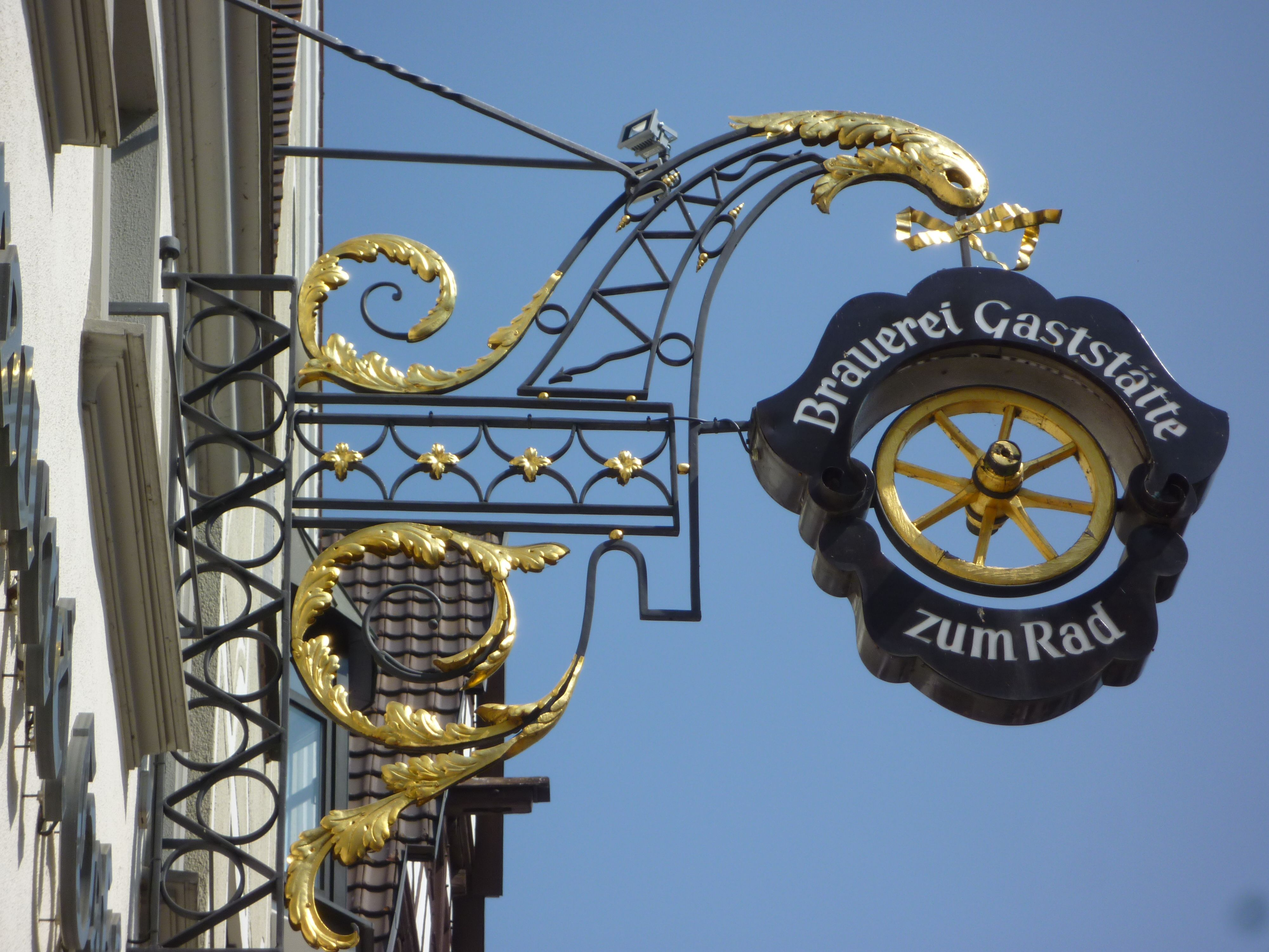 Günzburg - Gasthausschild Rad